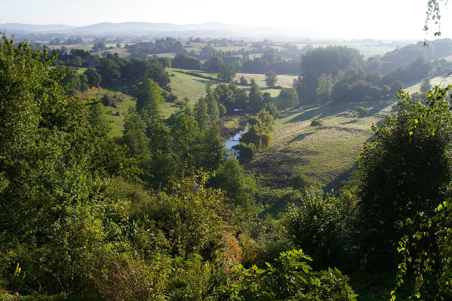 l'Erve auxVallées